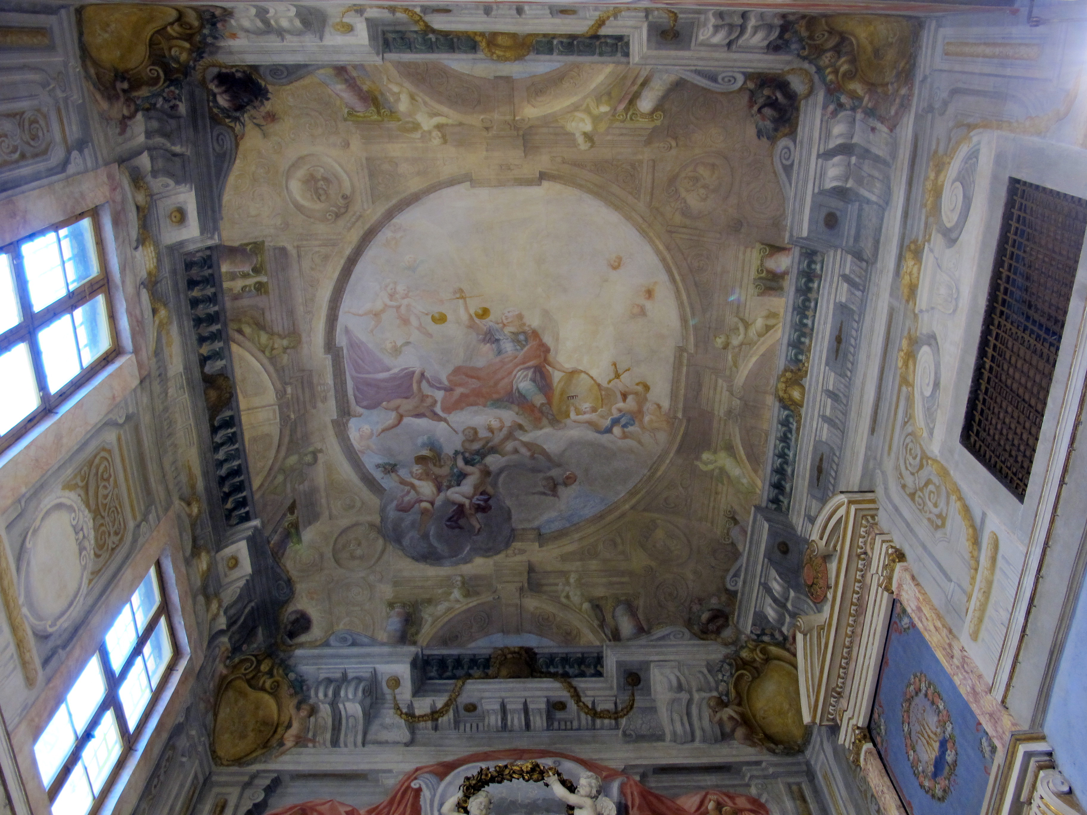 Santa maria degli angiolini, interno, volta di giovanni maria ciocchi